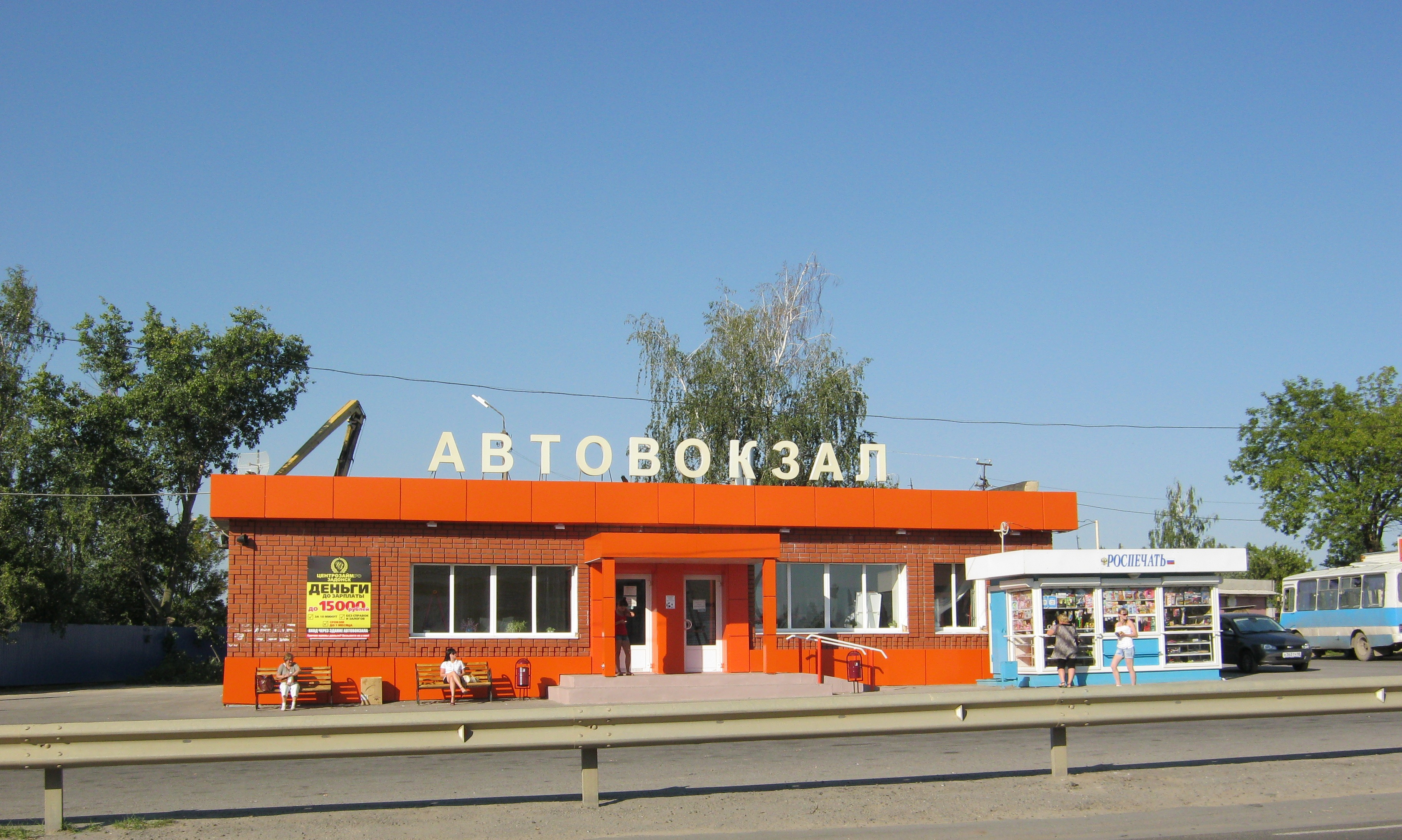 г.Задонск. Автовокзал